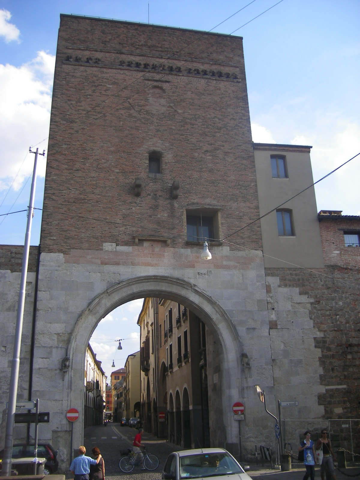 Padova